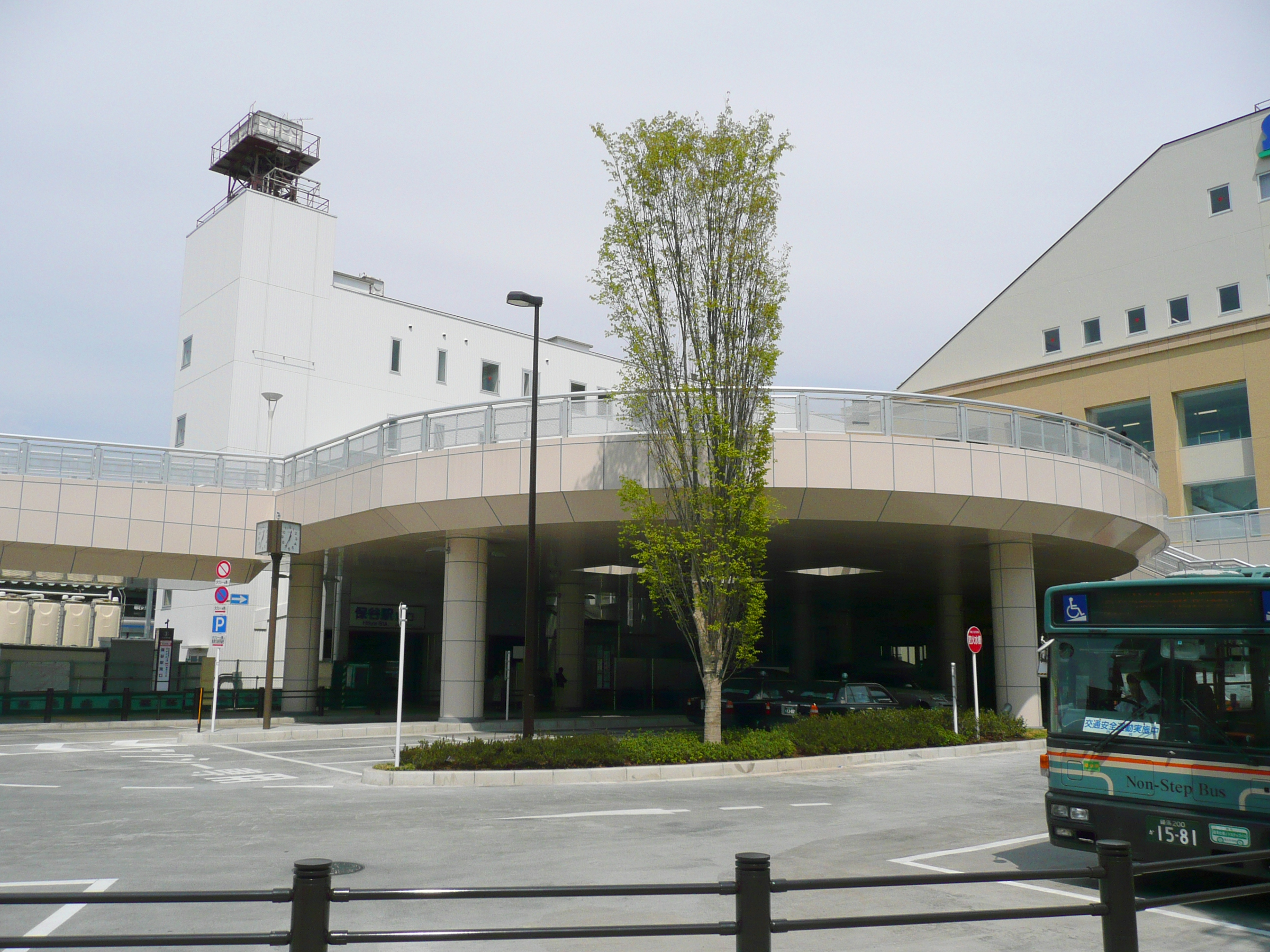 保谷駅南口